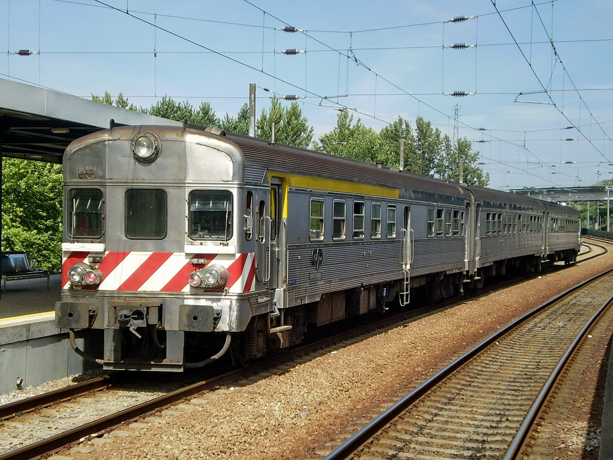 Серия 0600